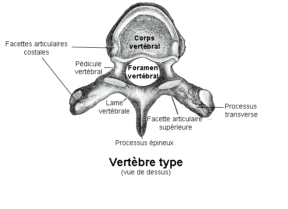 Vertèbre type. Anatomie humaine